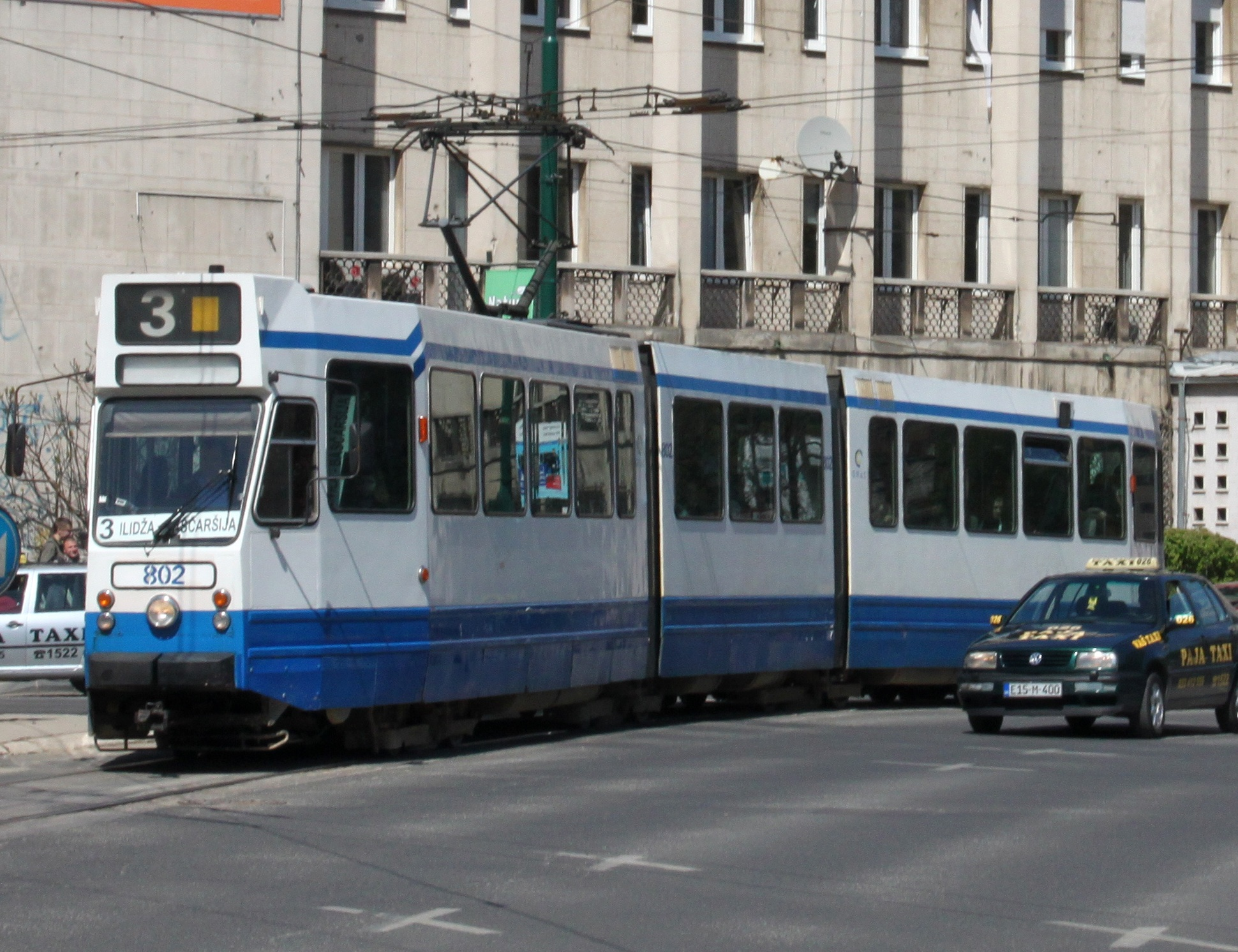 Een voormalige Amsterdamse tram nu ingezet op het tramnet van Sarajevo.